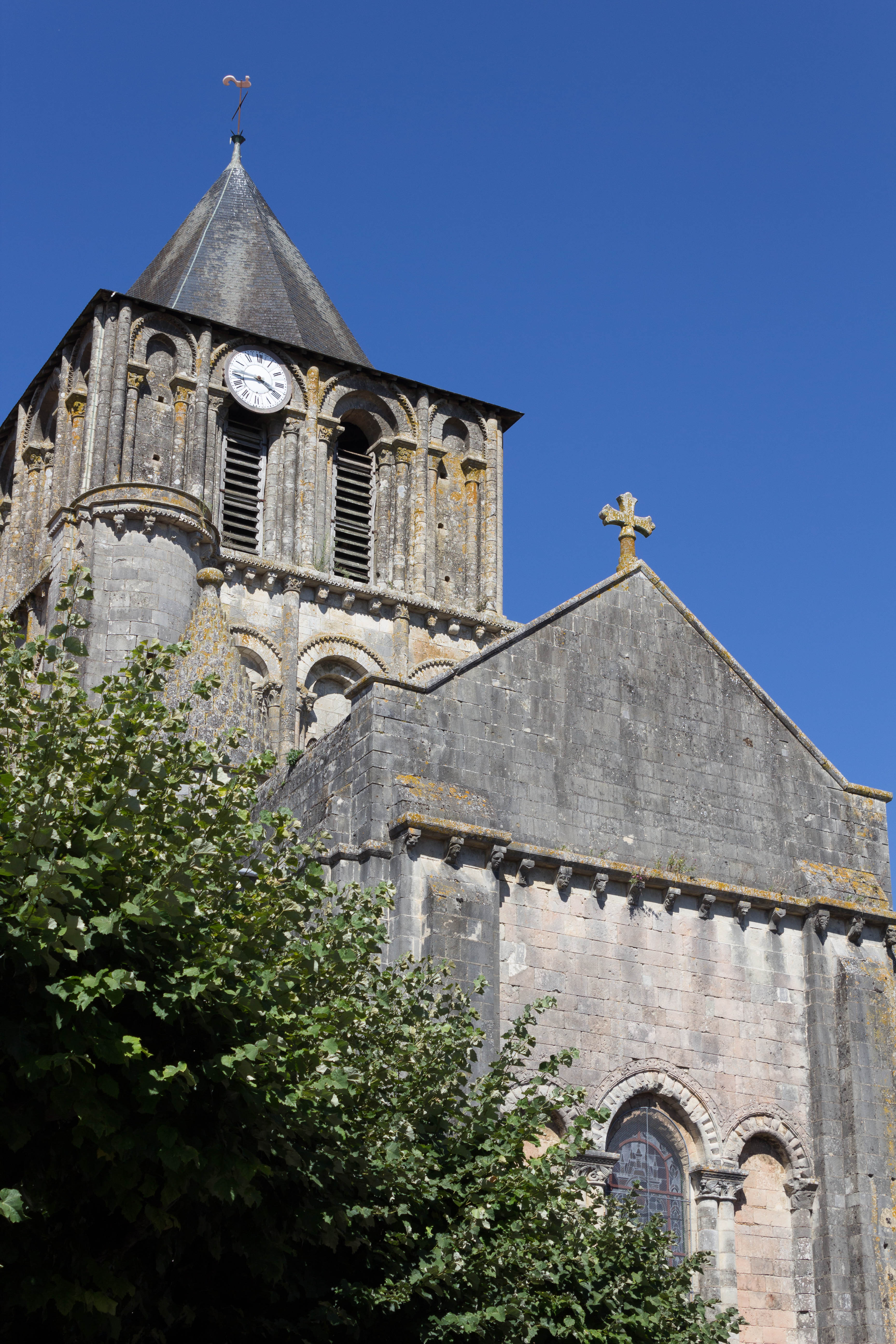 Église Notre-Dame-et-Saint-Junien de Lusignan (classé) .